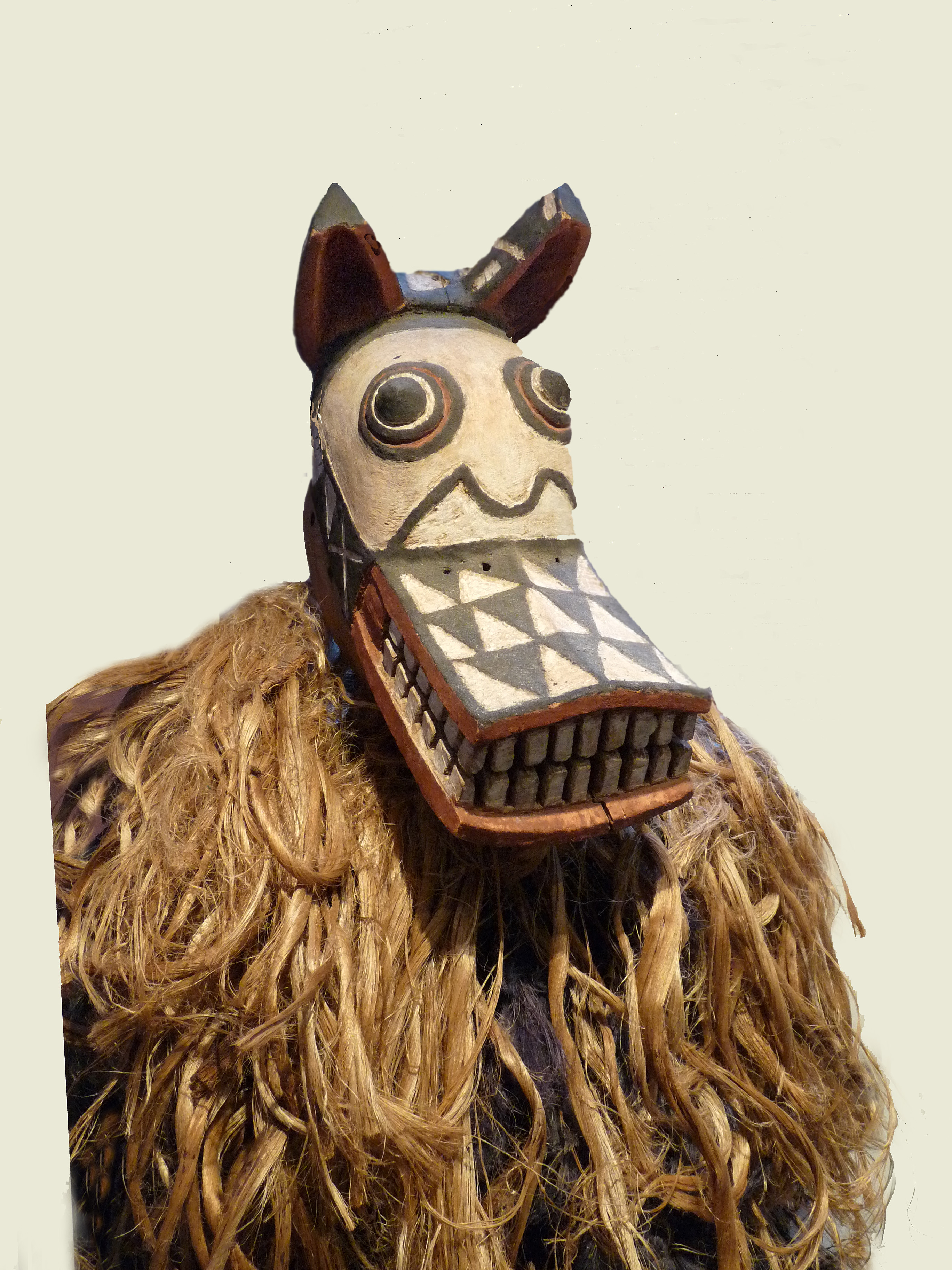 Masque hyène Bwa. Village de Boni, Burkina Faso. Bois, pigments, goudron végétal, fibres végétales. Musée barrois (Bar-le-Duc)